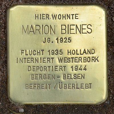 Stolperstein Sophienstr 12 Bienes Marion